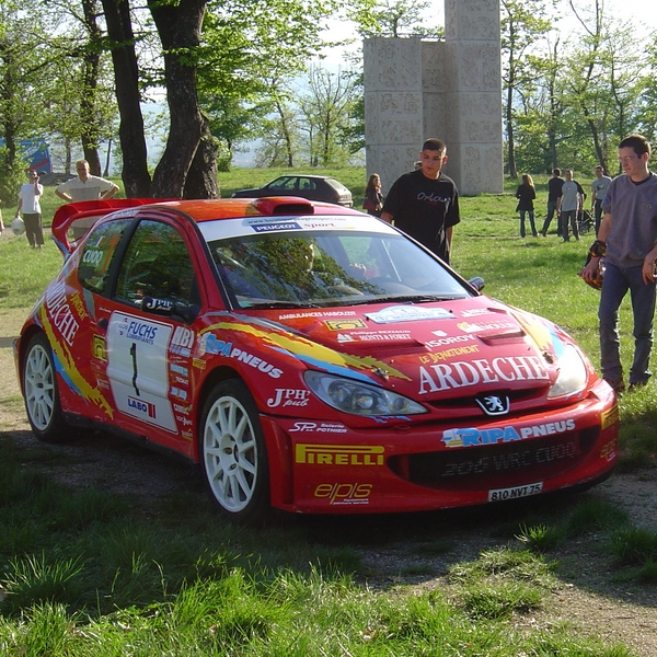 Photo de la 206 WRC de Jean-Marie Cuoq lors du Rallye de la Ville d'Annonay 2005.